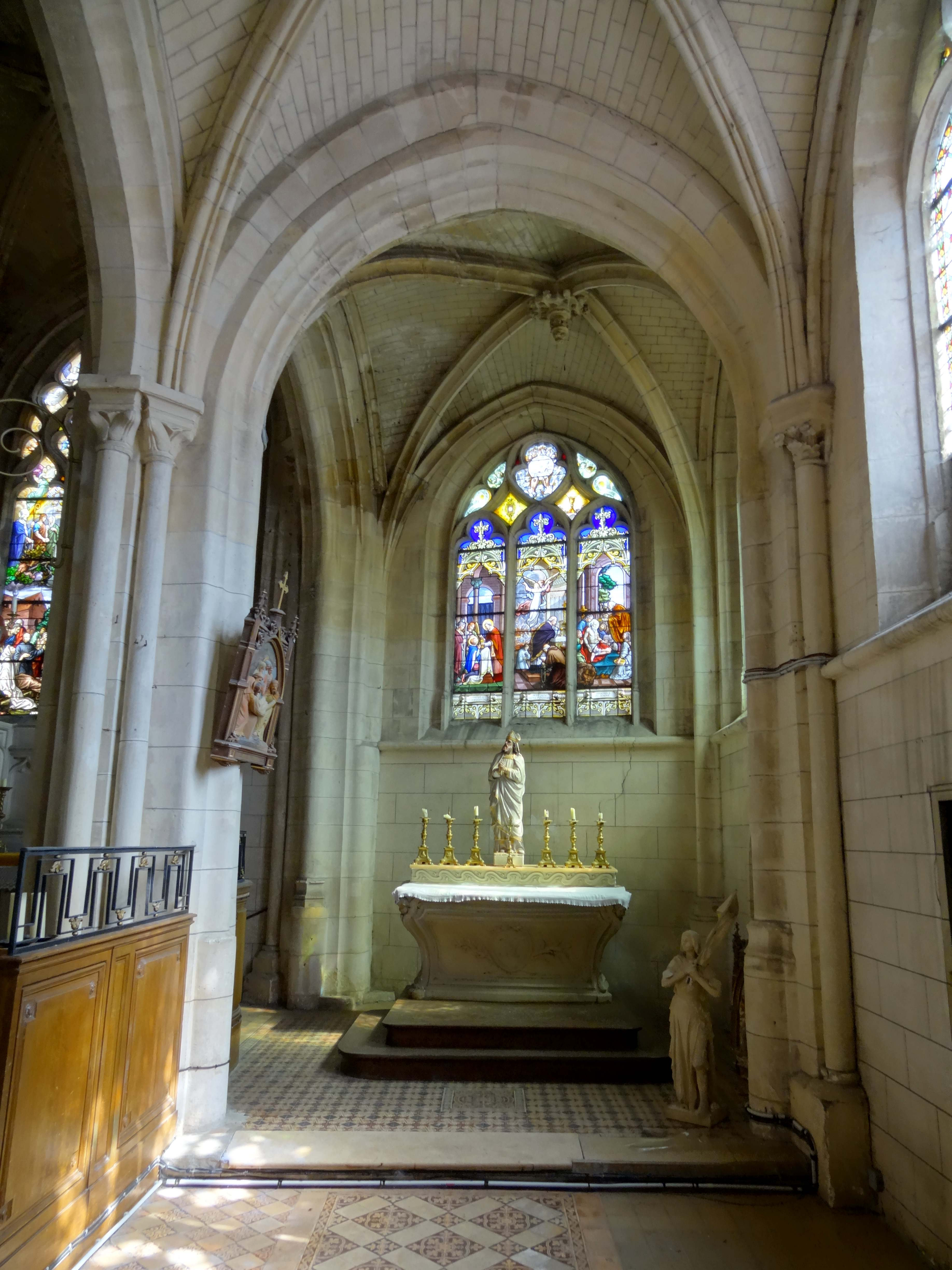 Intérieur de l'église - voir titre.